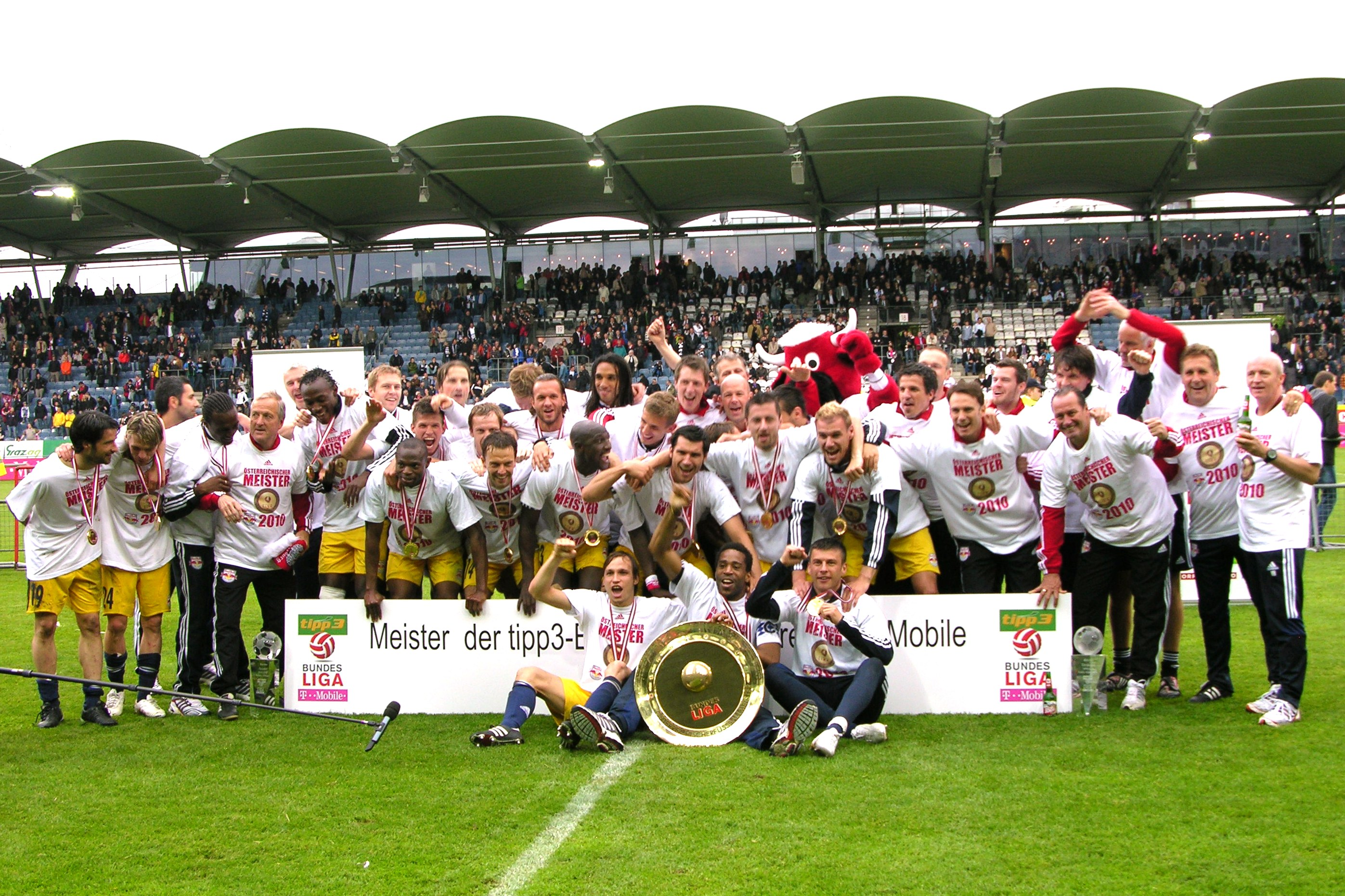 Bundesligameisterschaftsfinale 2009/2010 Sturm : Salzburg